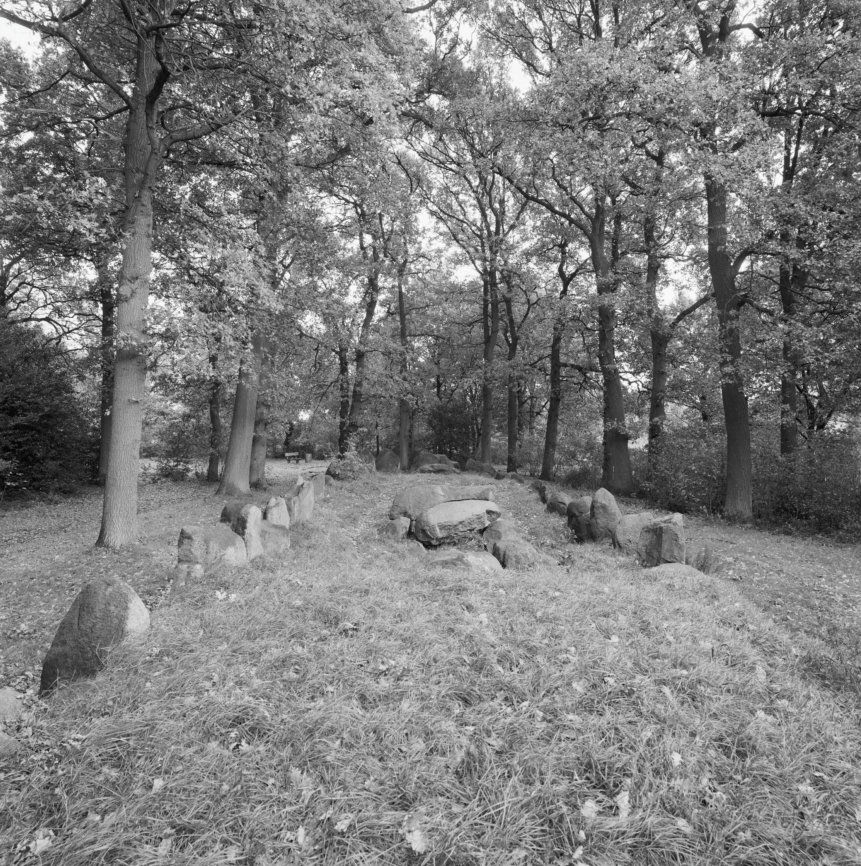 Hunebed D 43: Exterieur overzicht hunebed (opmerking: Monumenten In Nederland Drenthe)